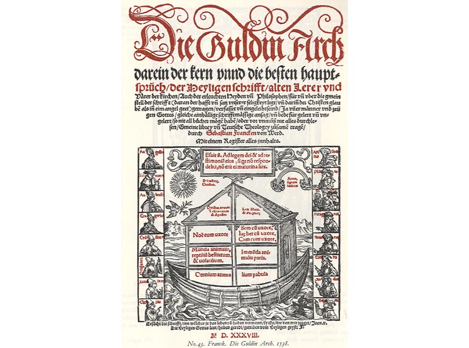 Die guldin Arch (L'arca d'oro)